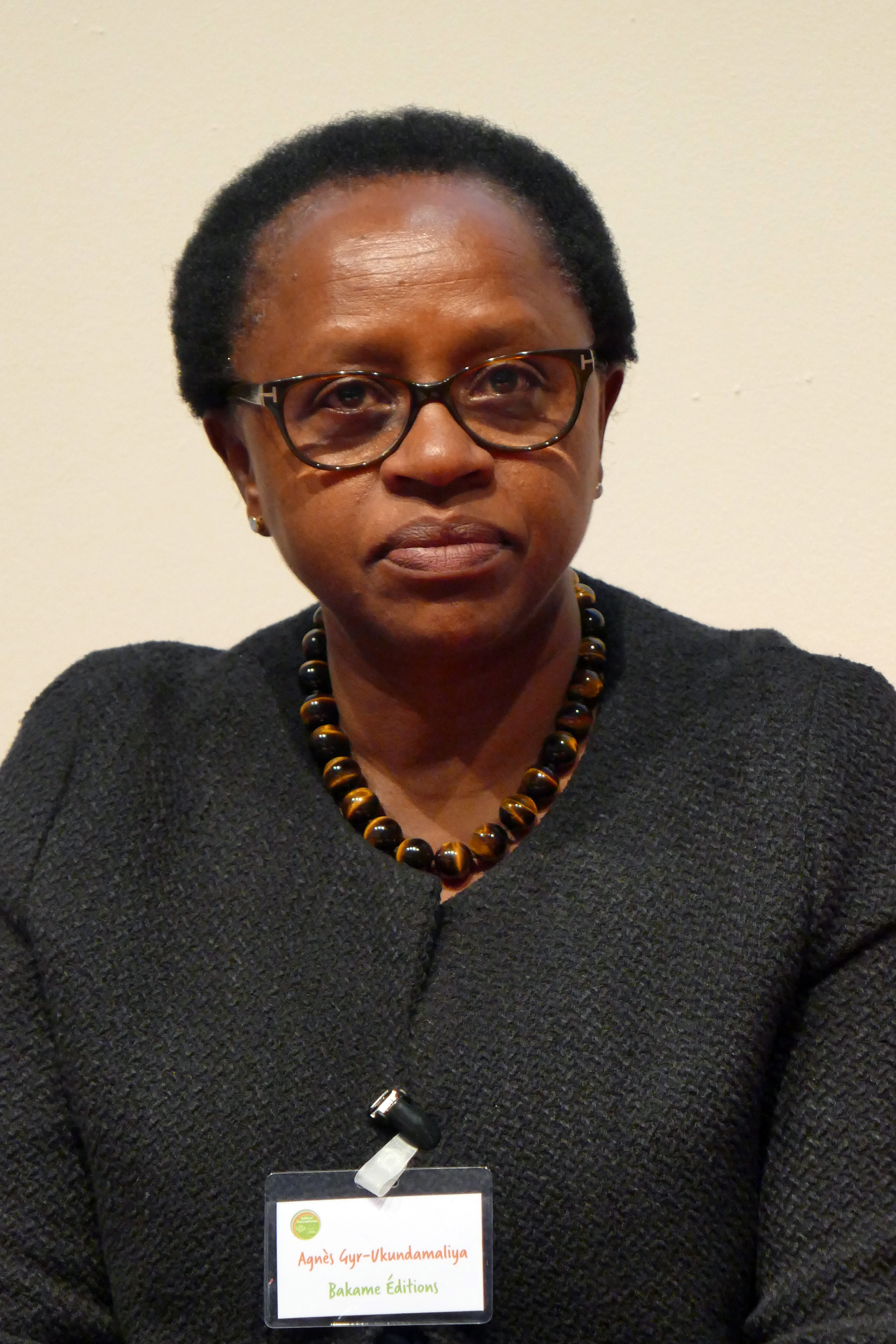 Agnès Gyr-Ukunda, directrice des éditions Bakame (Rwanda), lors de la table-ronde Publizieren in Afrika / Publishing in Africa, à la Foire du livre de Francfort 2017.